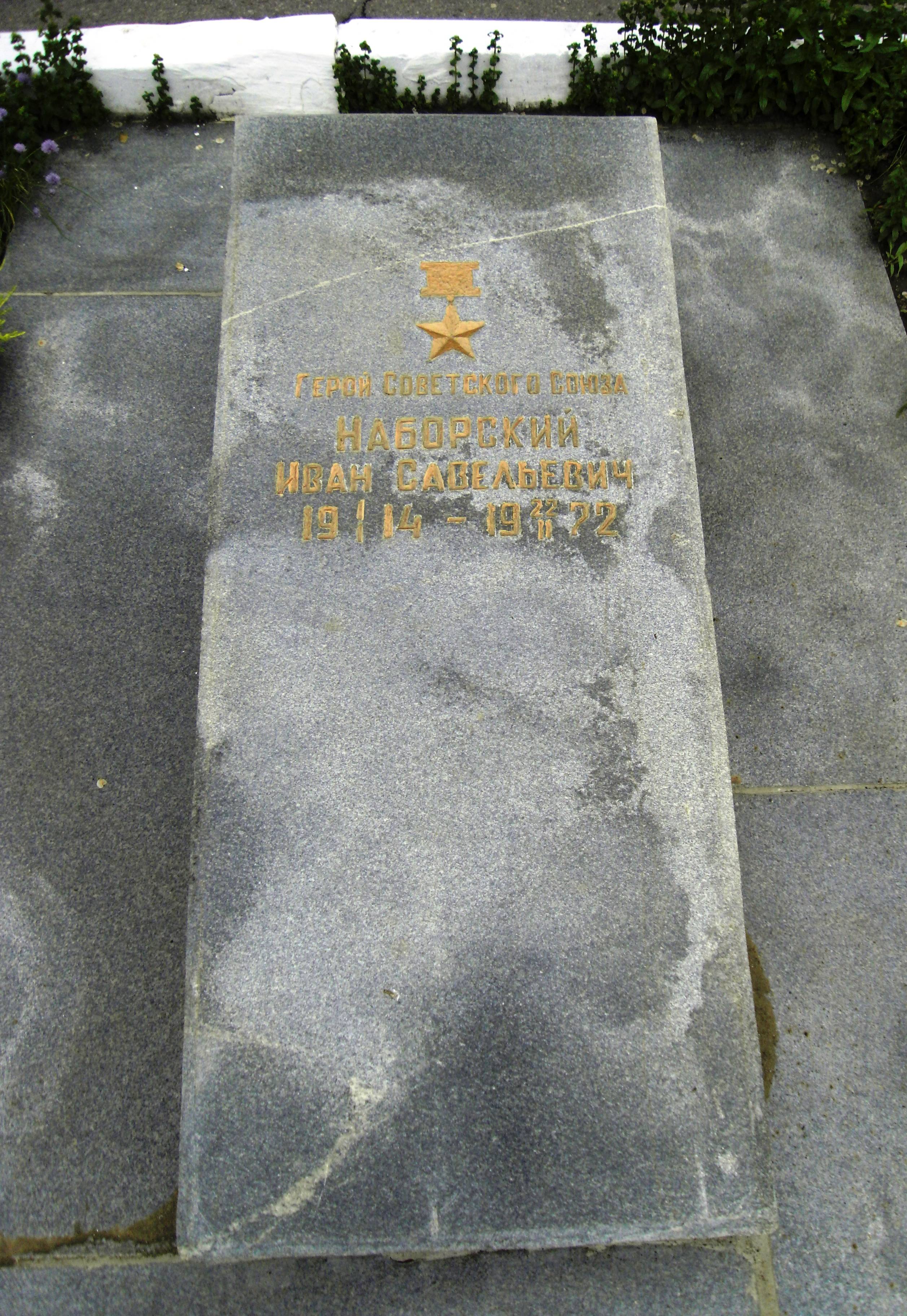 Наборський Іван Савелійович, плита на могилі перед ВО Дзержинськвугілля, місто Дзержинськ